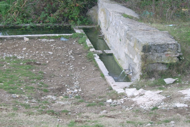 Чешмата във местността Улуклий -- С.Левски, общ. Панагюрище, обл. Пазарджик,БЪЛГАРИЯ